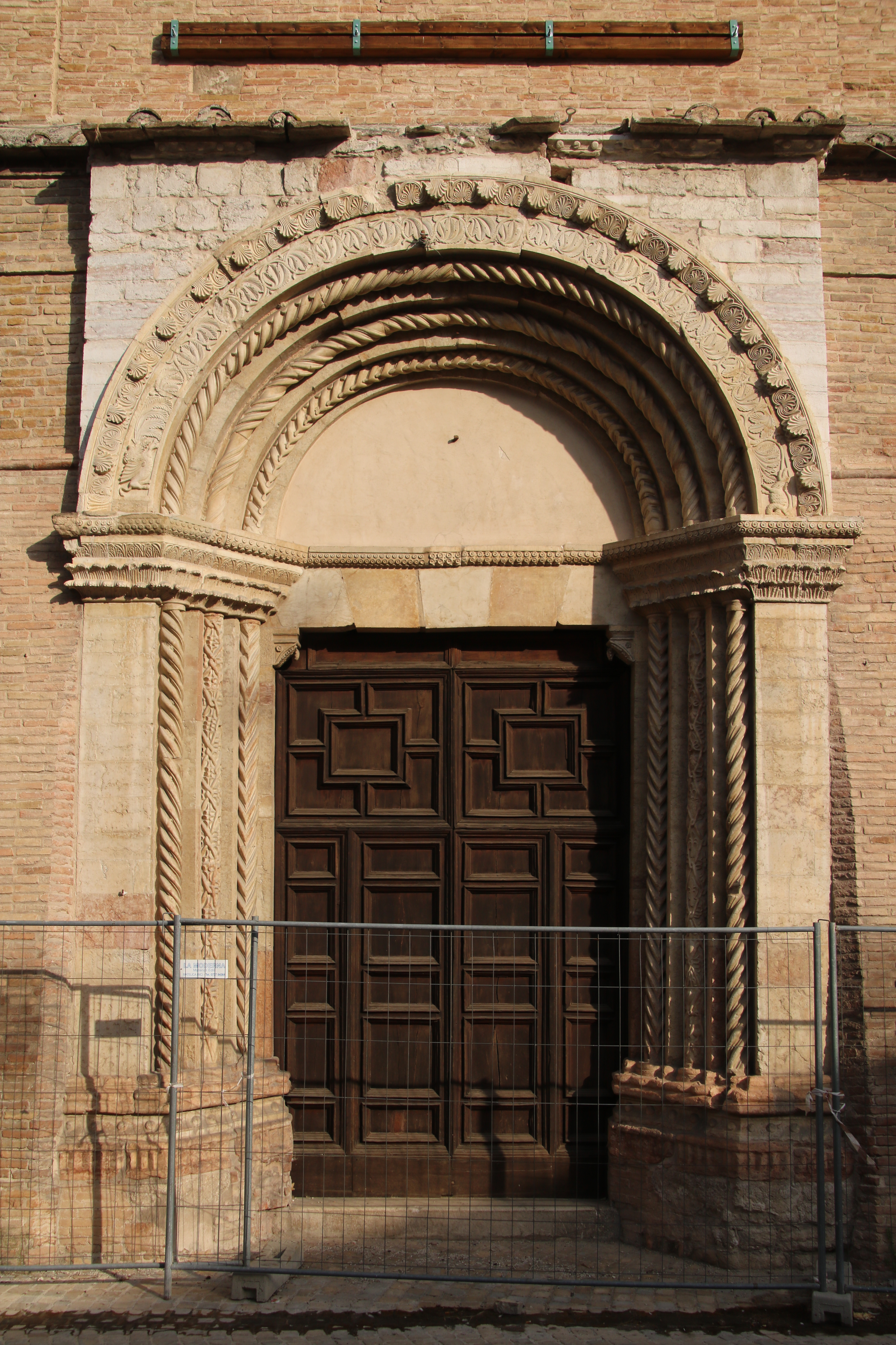 Chiesa di Sant’ Agostino, Matelica